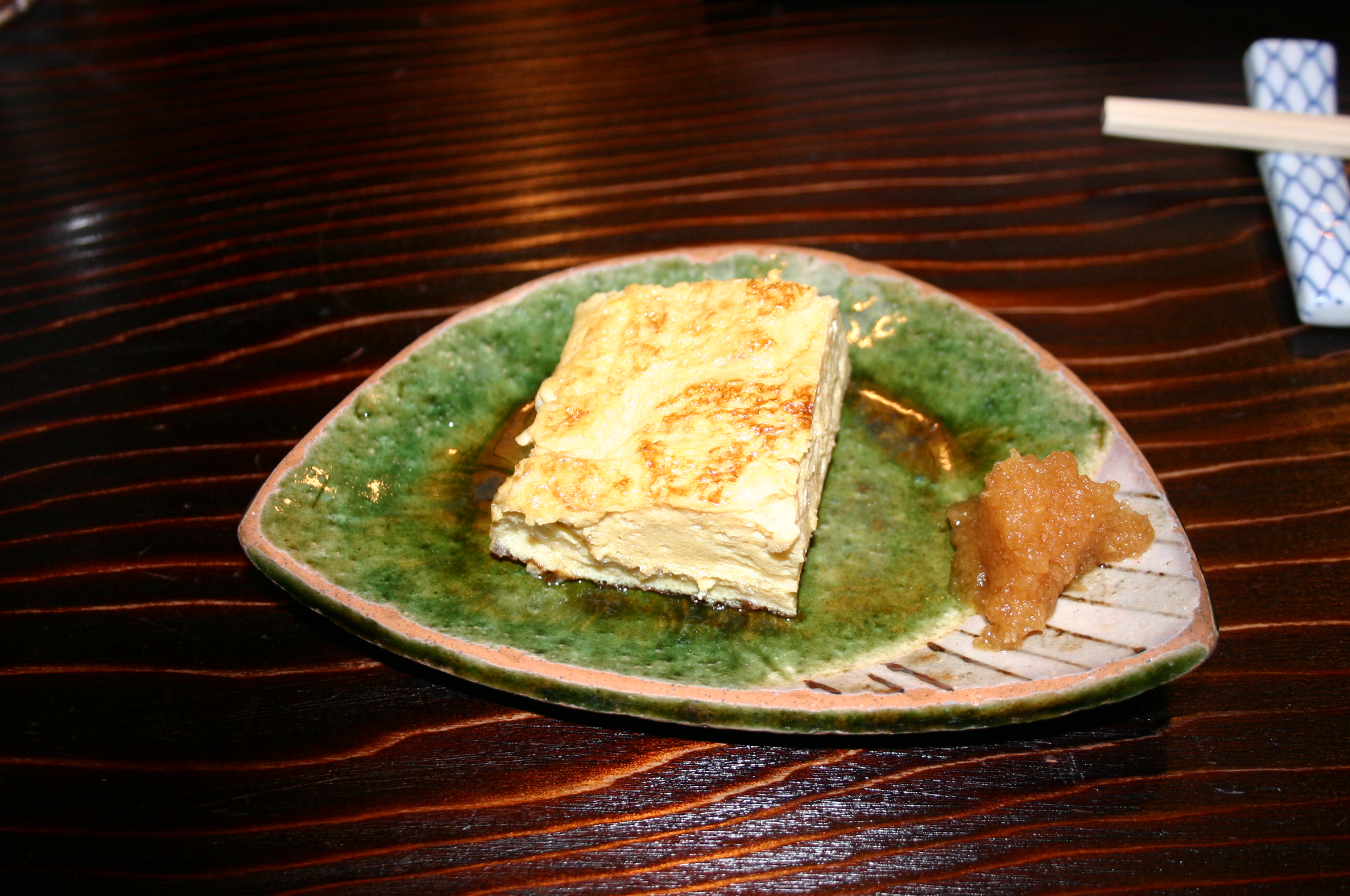 Tamago yaki. Foto scattata da me a Tokyo in un ristorante il 4.11.06.